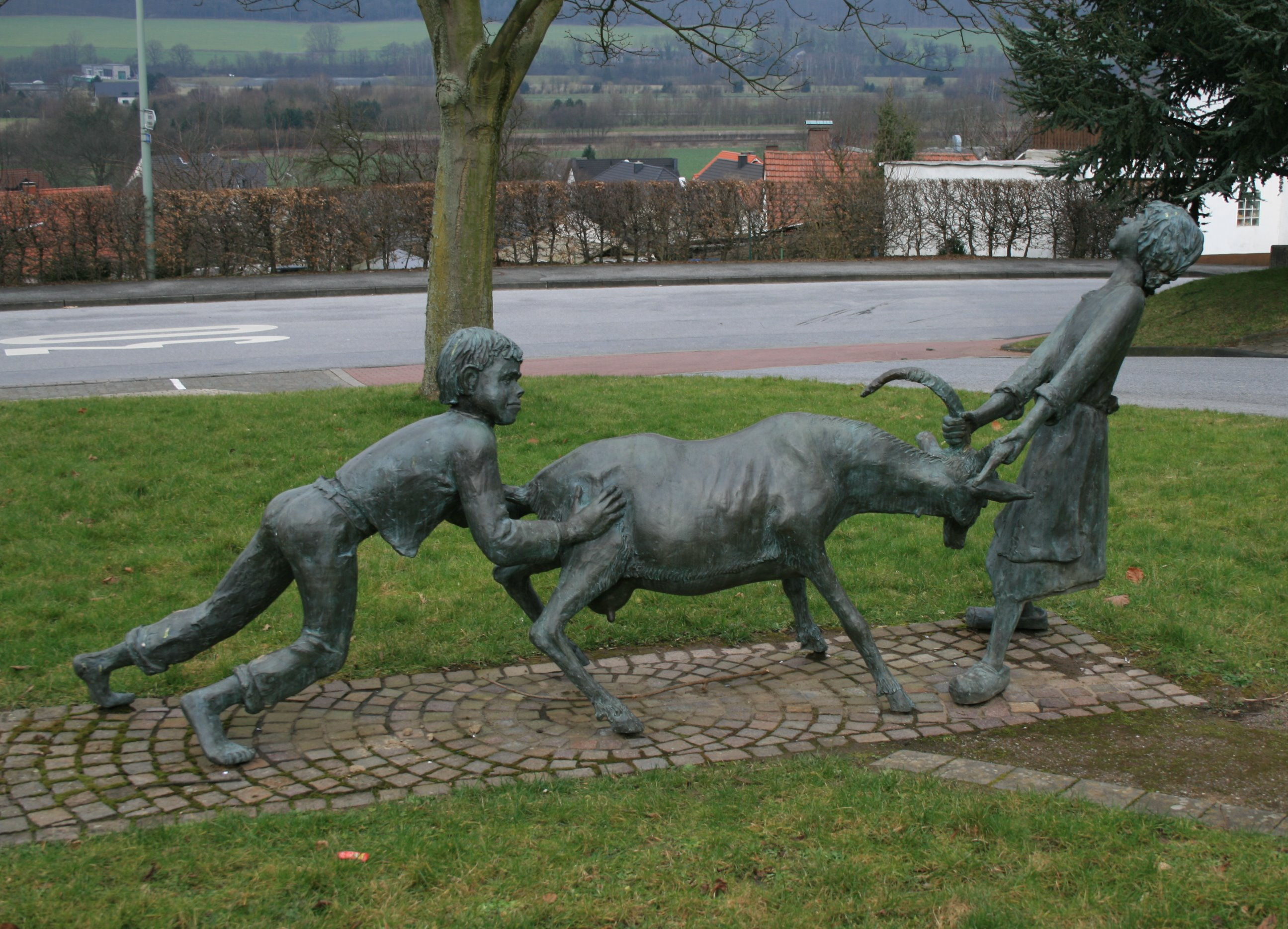 Skulptur im Ortsteil Echthausen der Gemeinde Wickede (Ruhr).